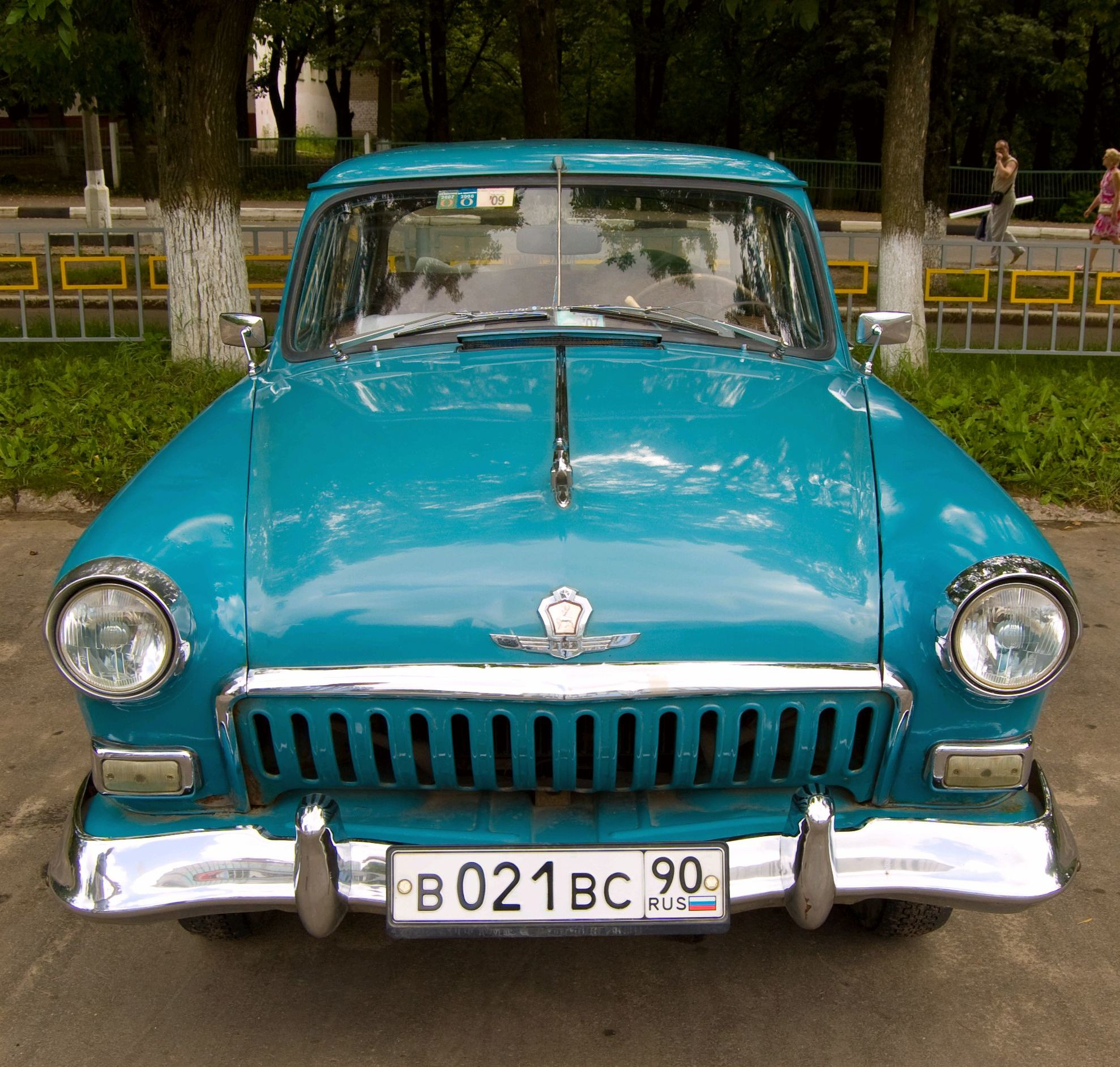 GAZ 21 Volga